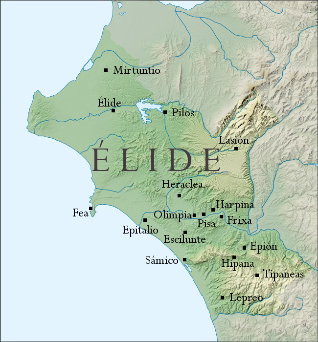 Mapa con la situación de algunas de las ciudades de la antigua Élide.